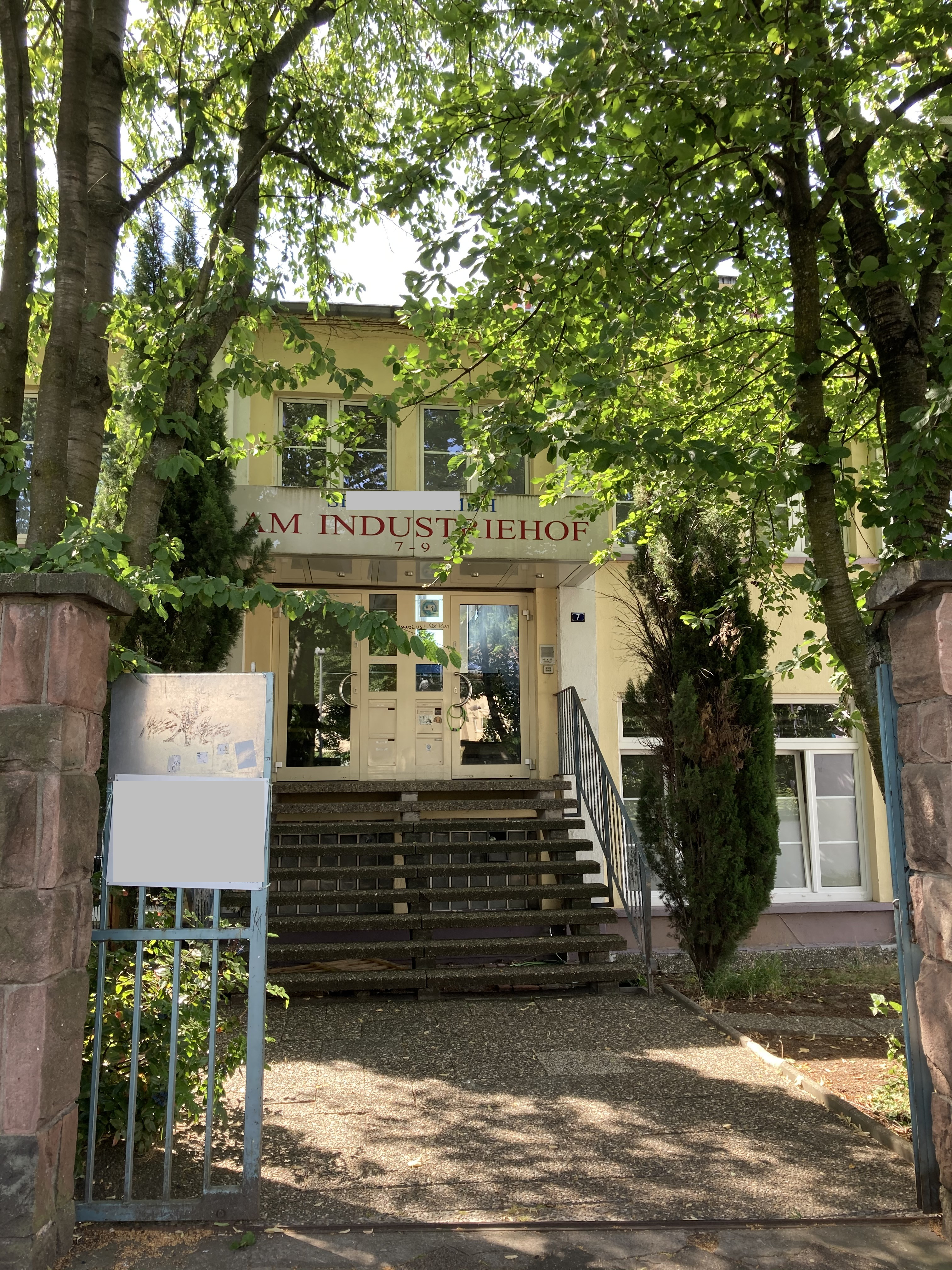 Standort des Frauenkulturhauses in Frankfurt am Main am Industriehof 7-9